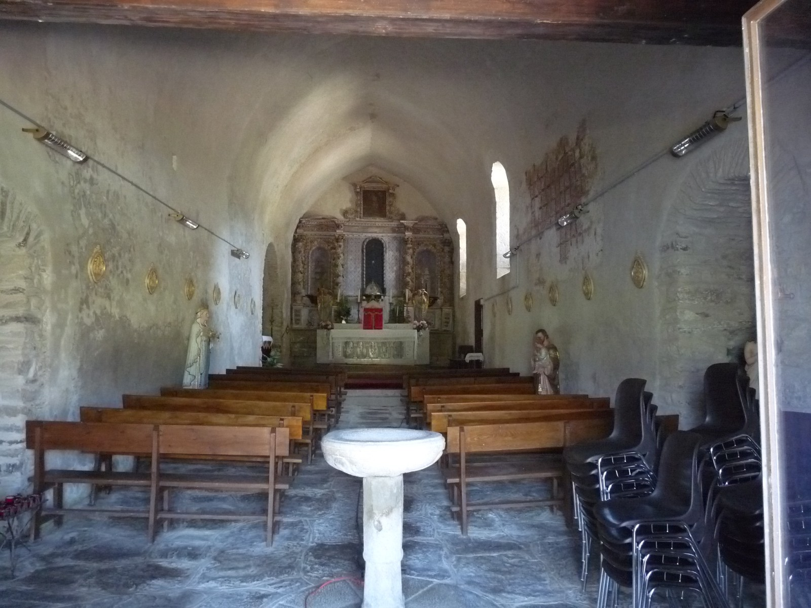 Eglise de Réal, Pyrénées-Orientales, France